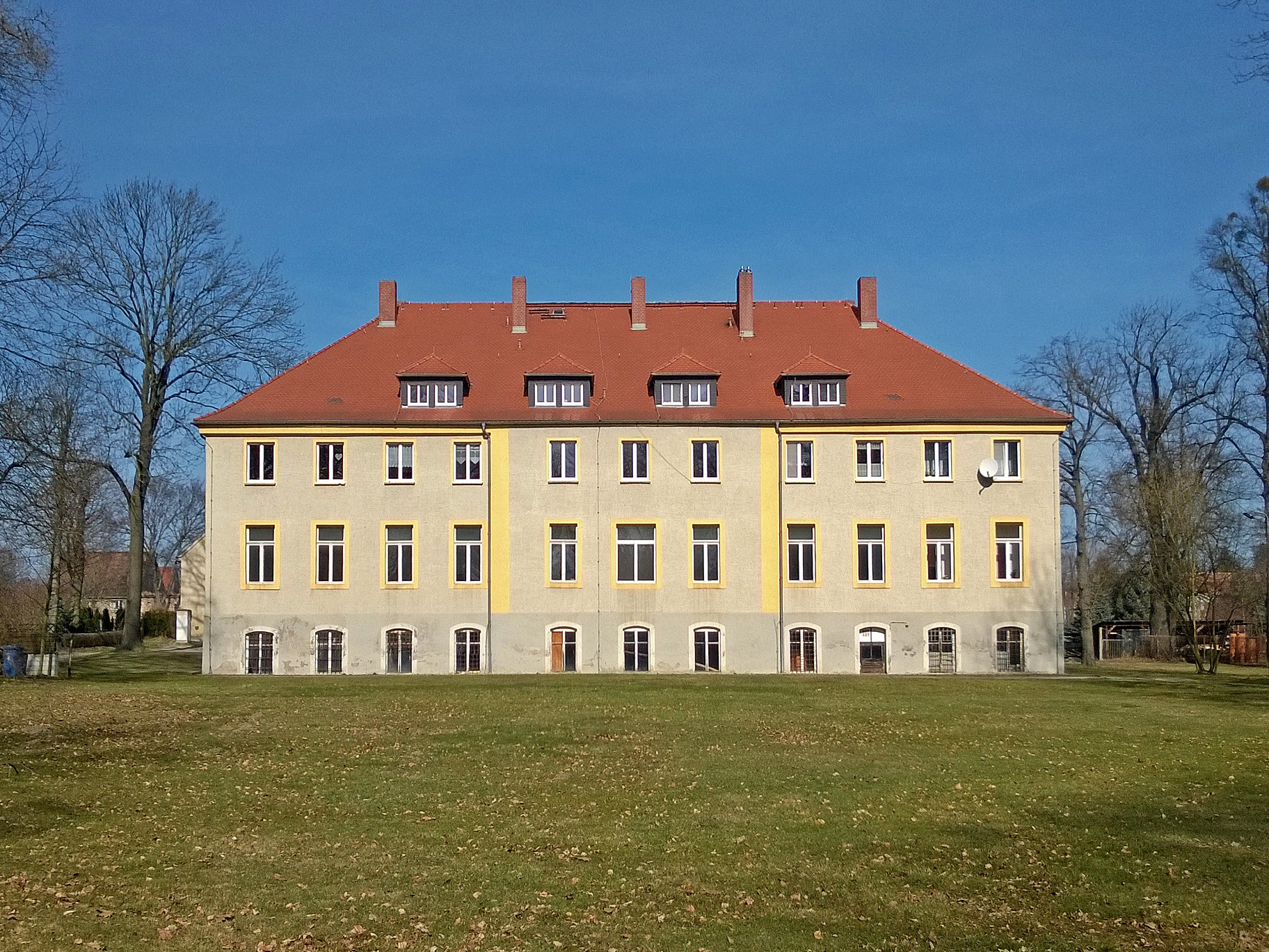 Schloss Buchholz - Parkseite